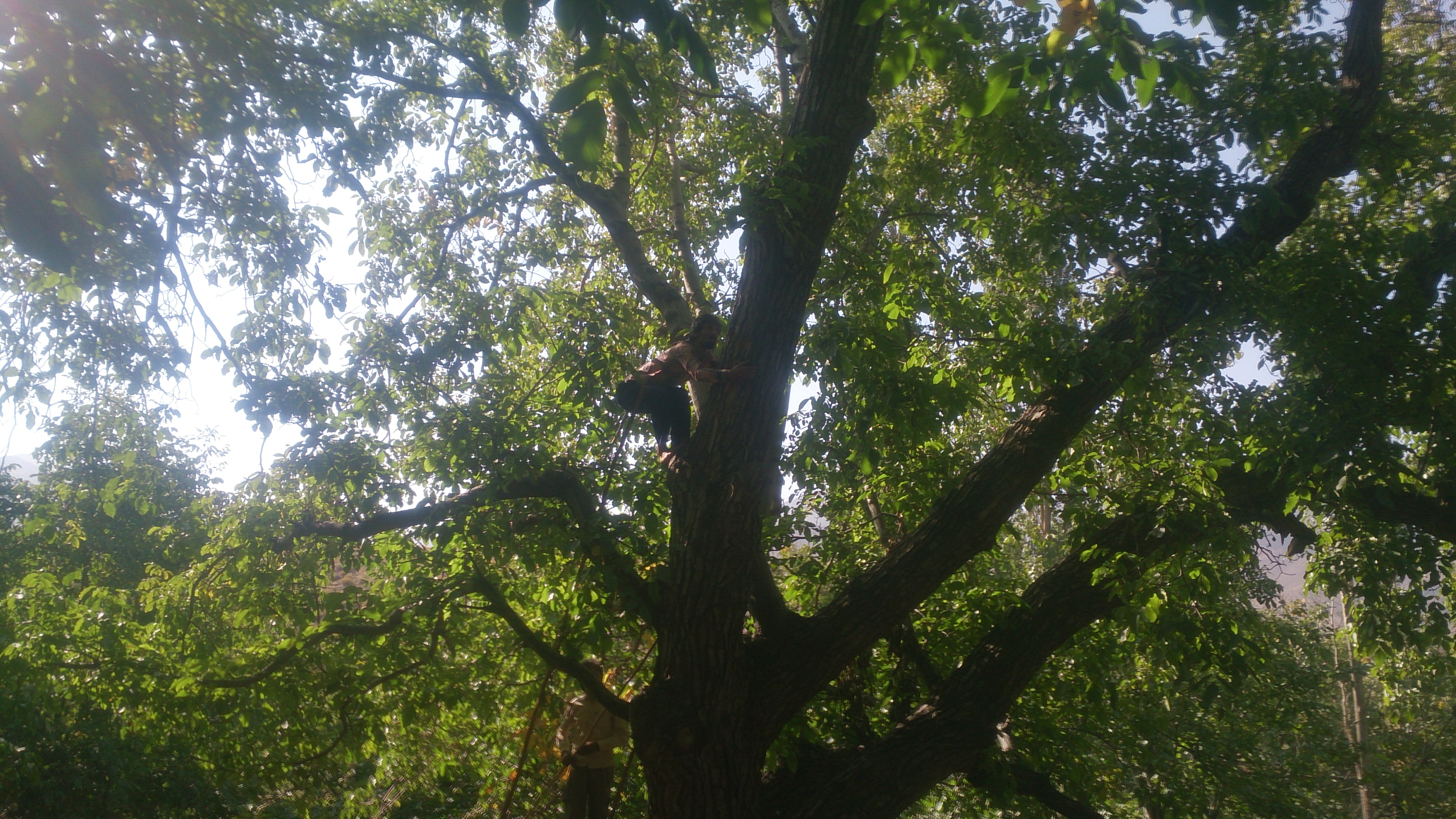 برداشت گردو (گردو تکانی) در روستای دامنه